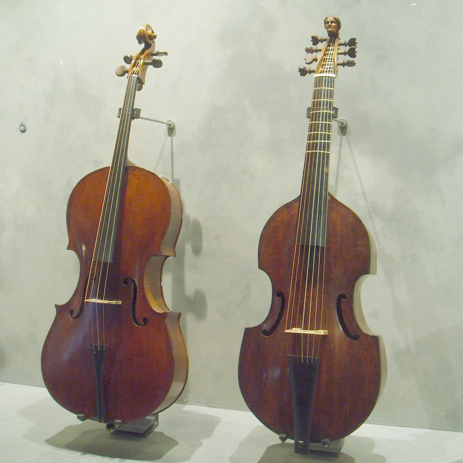 modern cello and viol - Paris, musée de la musique